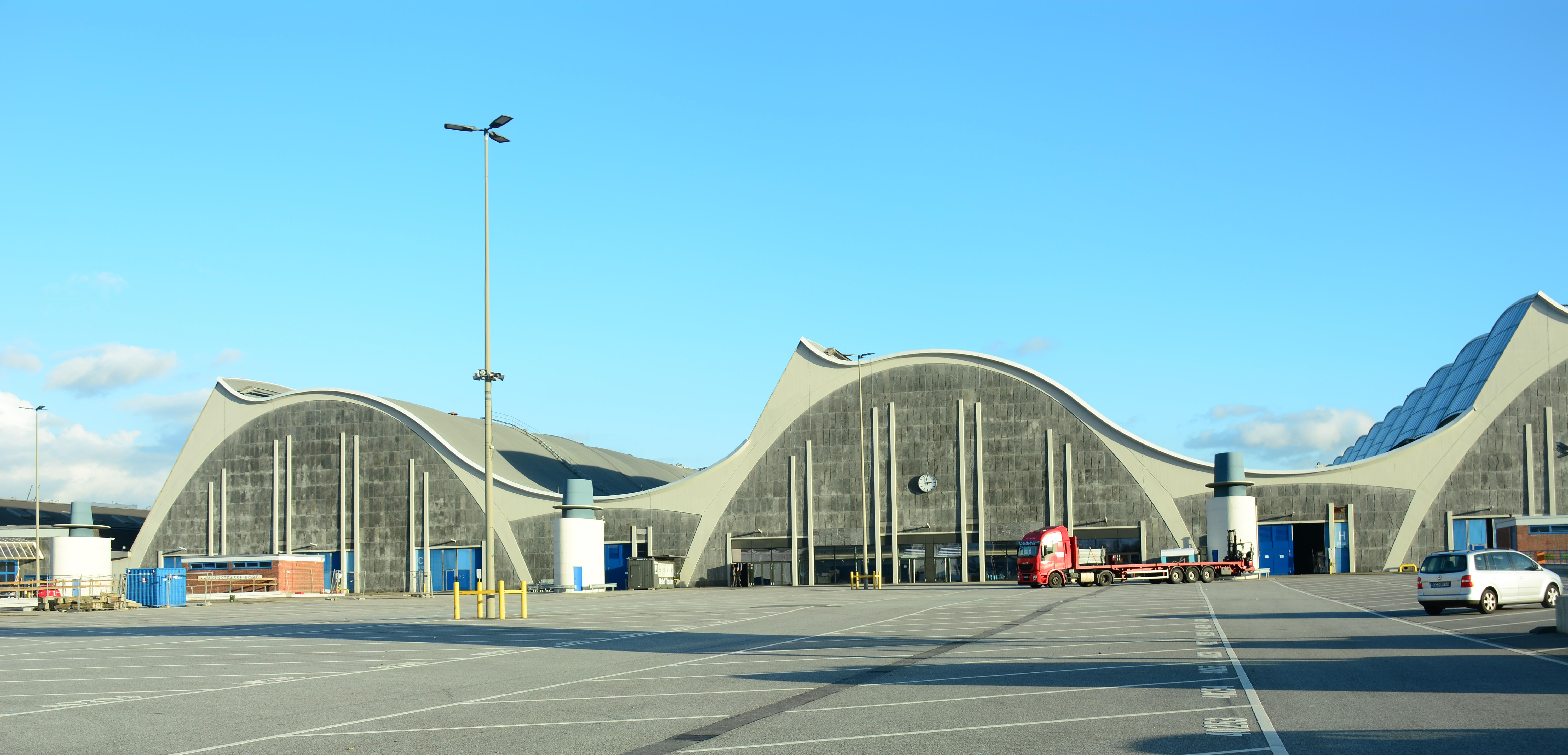 Die Westansicht der Großmarkthalle